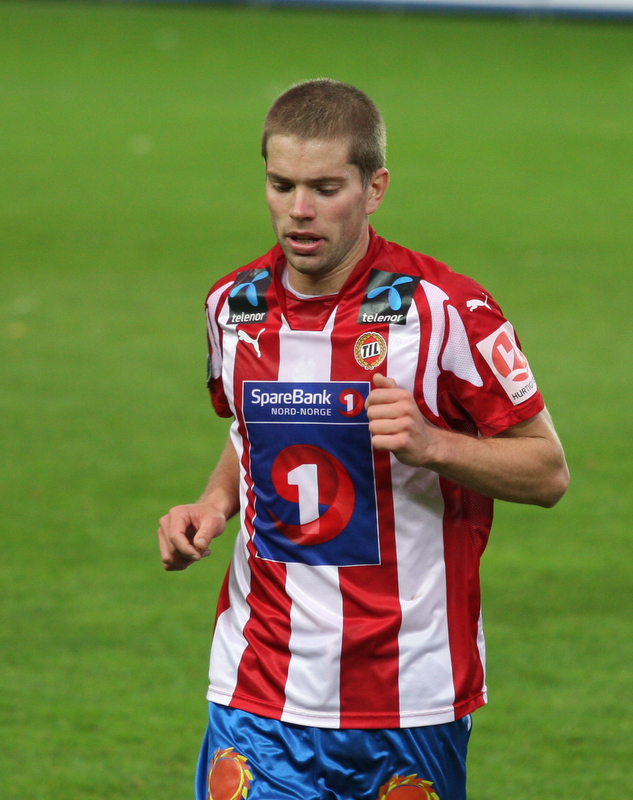 Helge Haugen, player for Tromsø IL